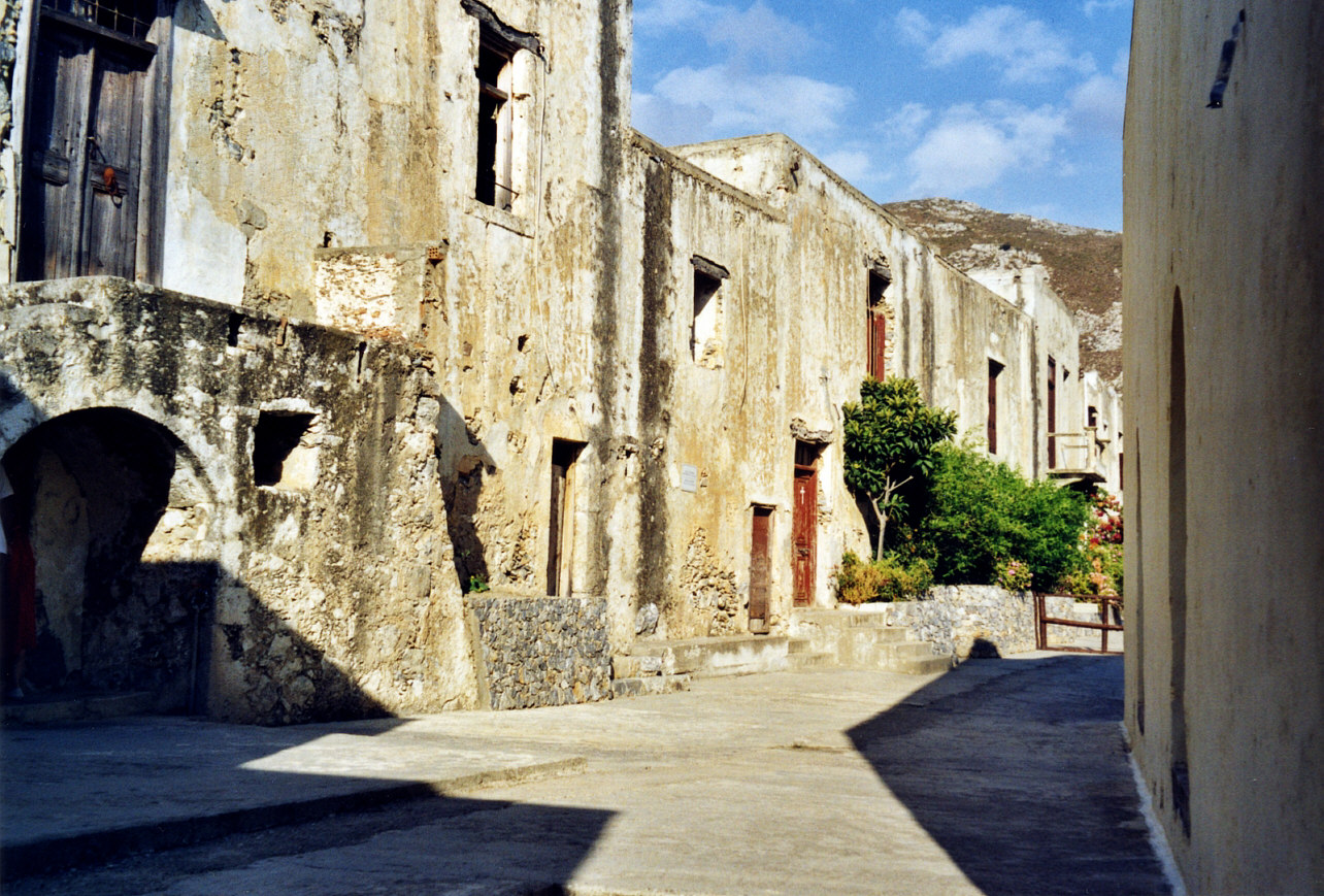 Kloster von Preveli, Kreta